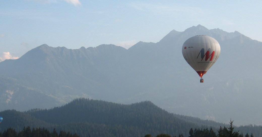 Signinagruppe von Norden: über dem Tenner Kreuz links der erste Gipfel, „Schlüechtli“, dann langer Grat bis zum „Nolla“. Es folgen „Oberhorn“, dann die höchste Stelle des Horizonts über dem Ballon „Piz Riein“ und rechts davon der höchste Punkt Piz Fess und der „Piz Signina“ rechts.